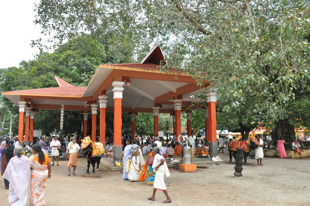 ഓച്ചിറ പരബ്രഹ്മക്ഷേത്രം